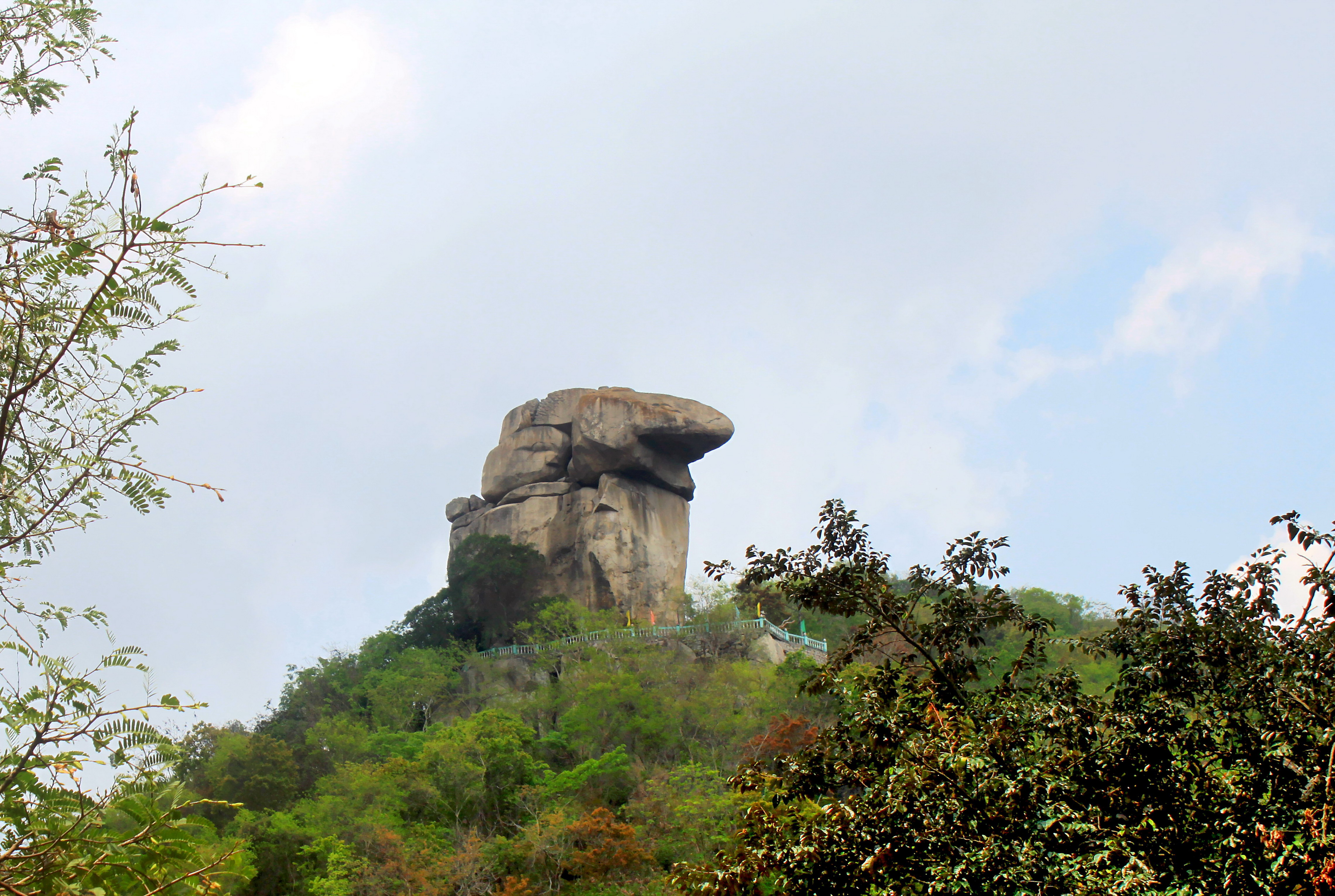 Một tảng đá khổng lồ nằm nhô ra trên đình núi Két ở Tịnh Biên (An Giang, Việt Nam), theo sự mường tượng của nhiều người, nó gần giống đầu chim két.